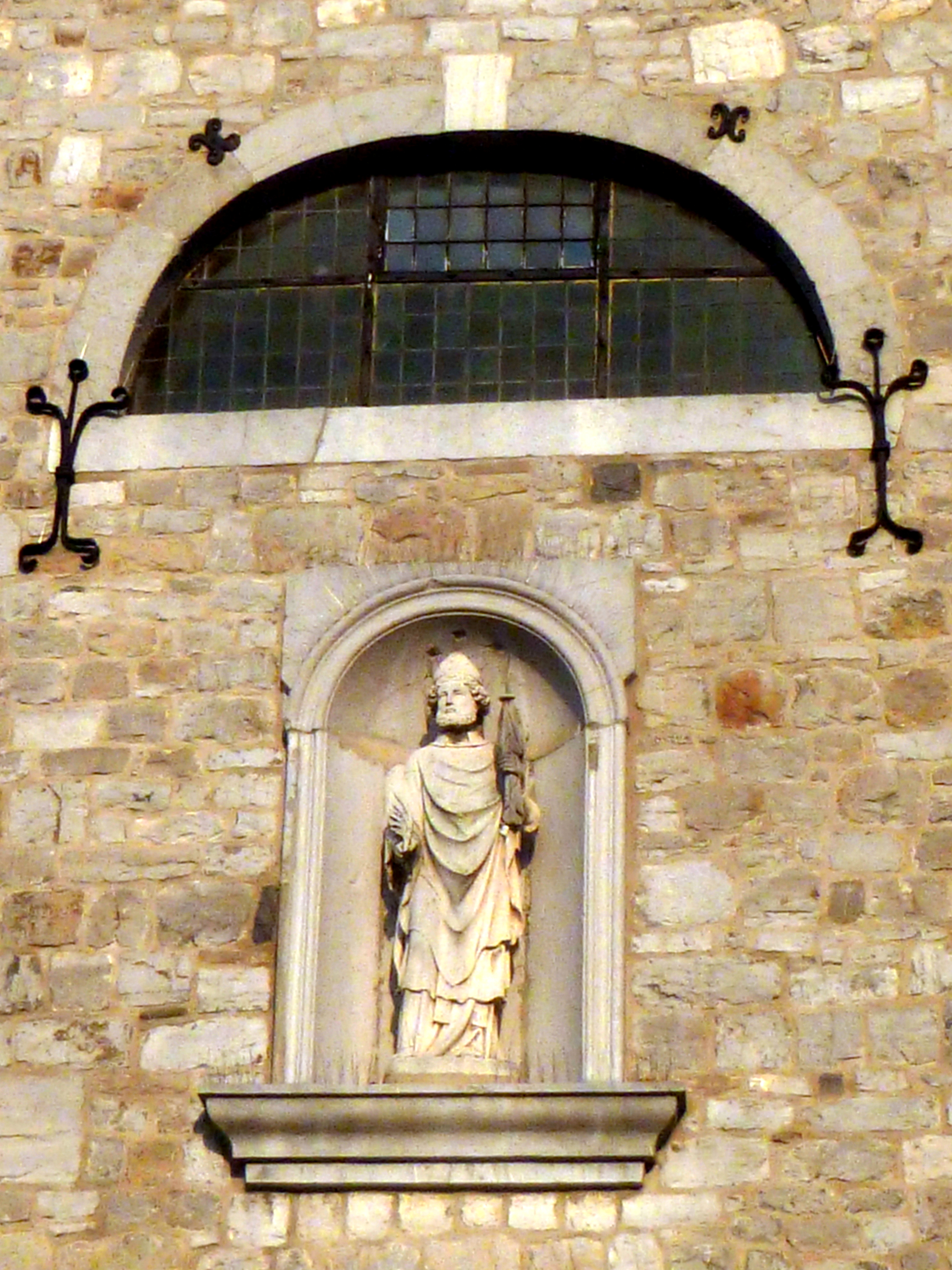 Figurennische und Fenster in der Westfront der Lambertuskapelle in Eupen